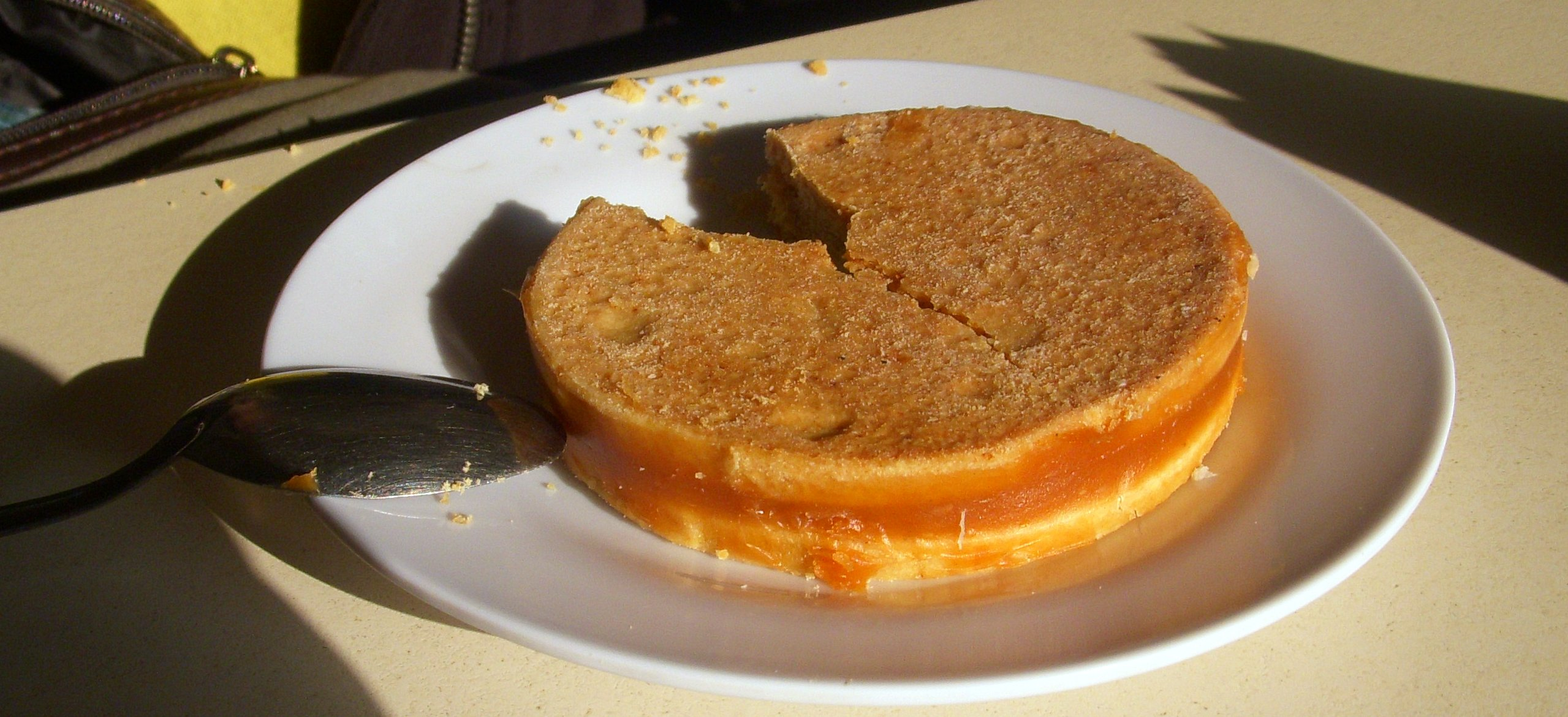 Alfajores